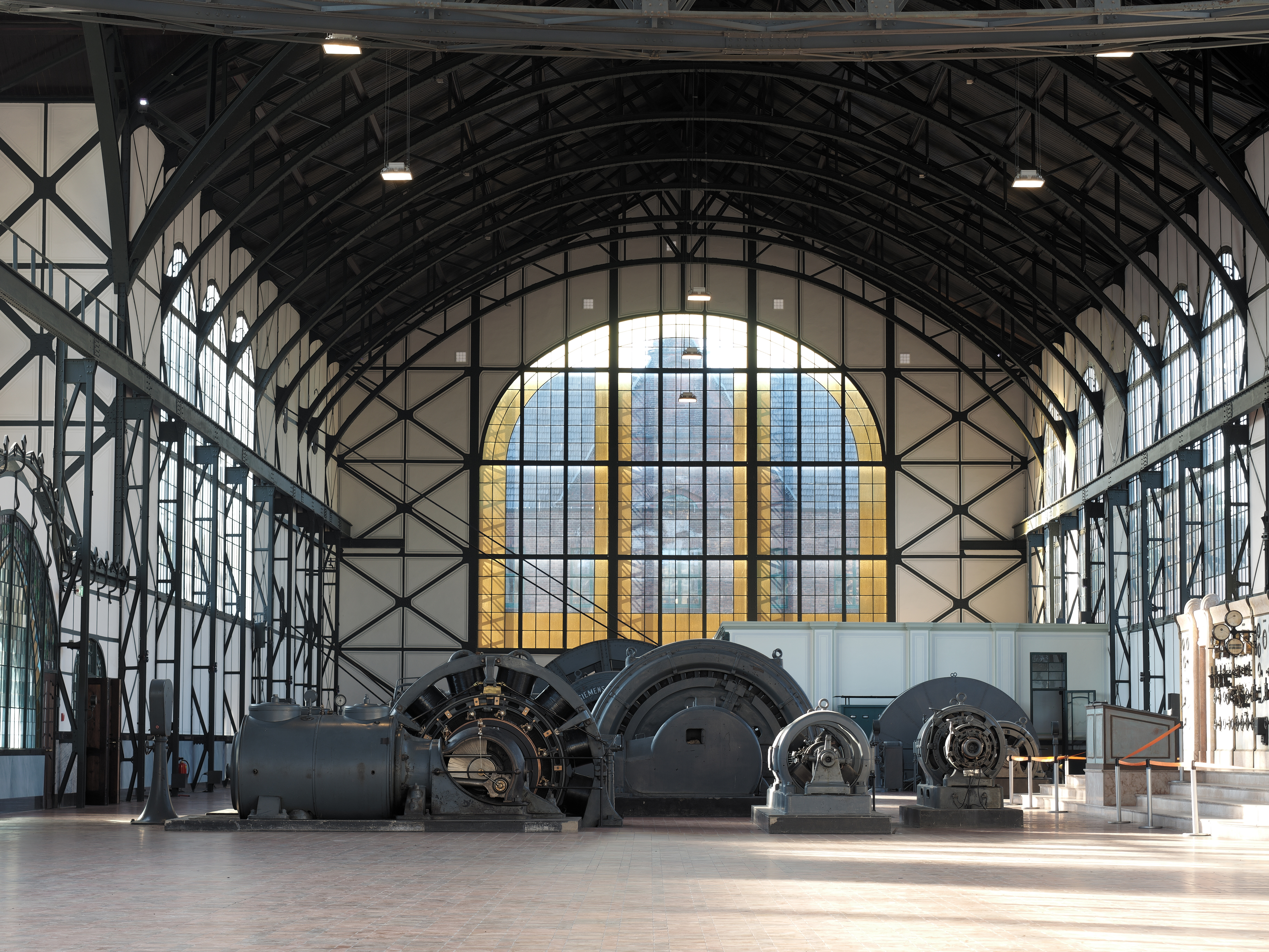 Zeche Zollern Maschinen in der bis 2016 renovierten Maschinenhalle der Zeche Zollern in Dortmund-Bövinghausen, Grubenweg, Jugendstilmonument.